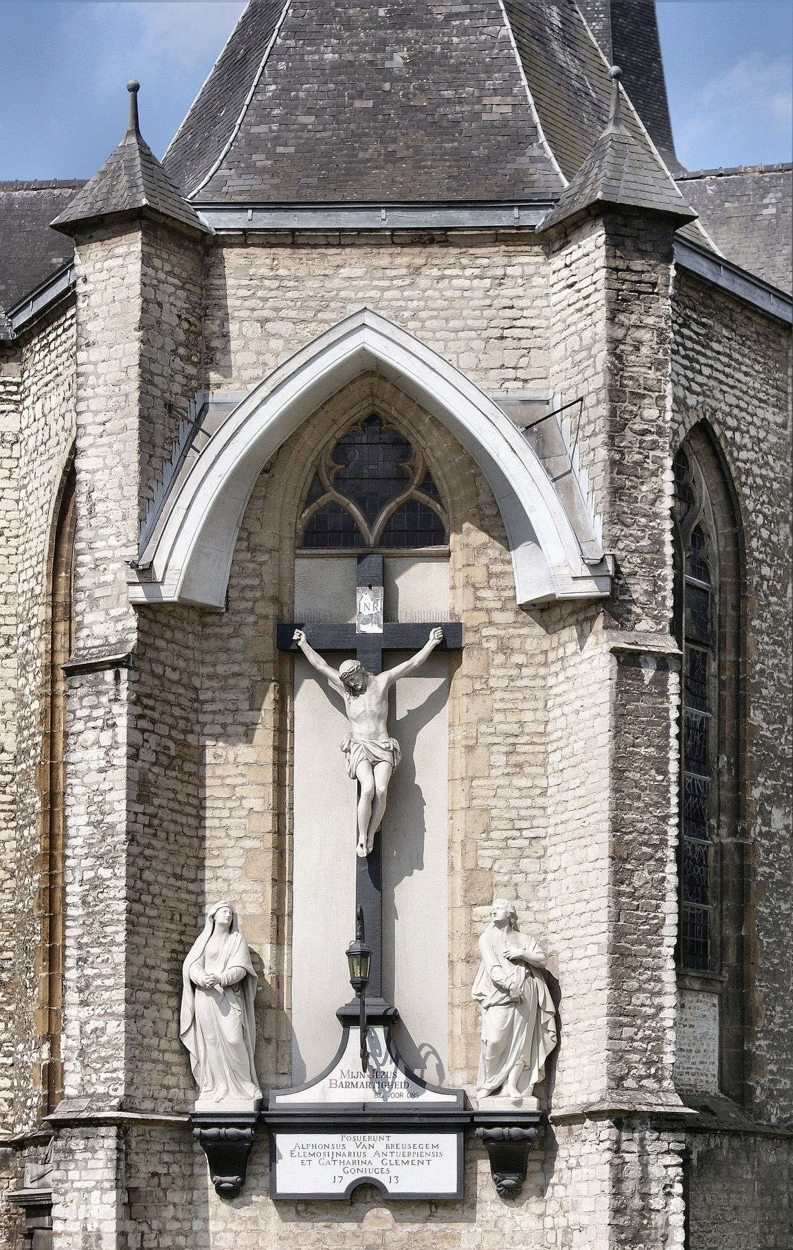 Sint-Willibrorduskerk (Berchem) - Kalvarieberg (1713).jpg